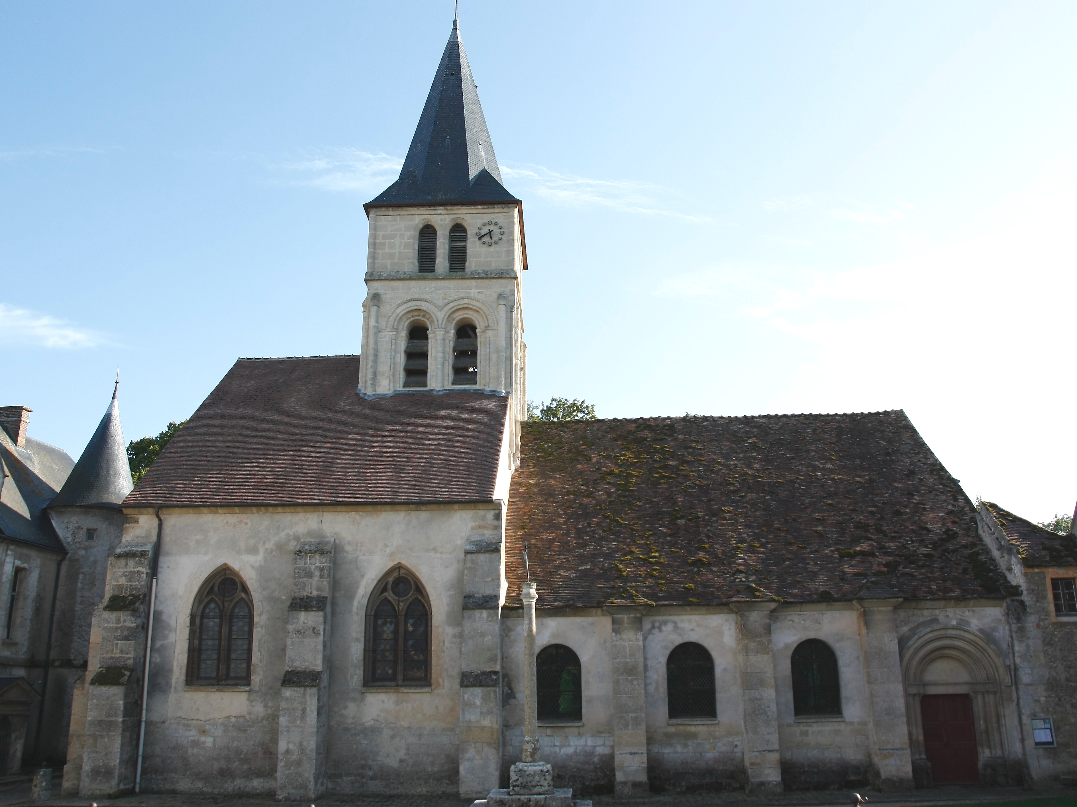 Eglise Notre Dame .